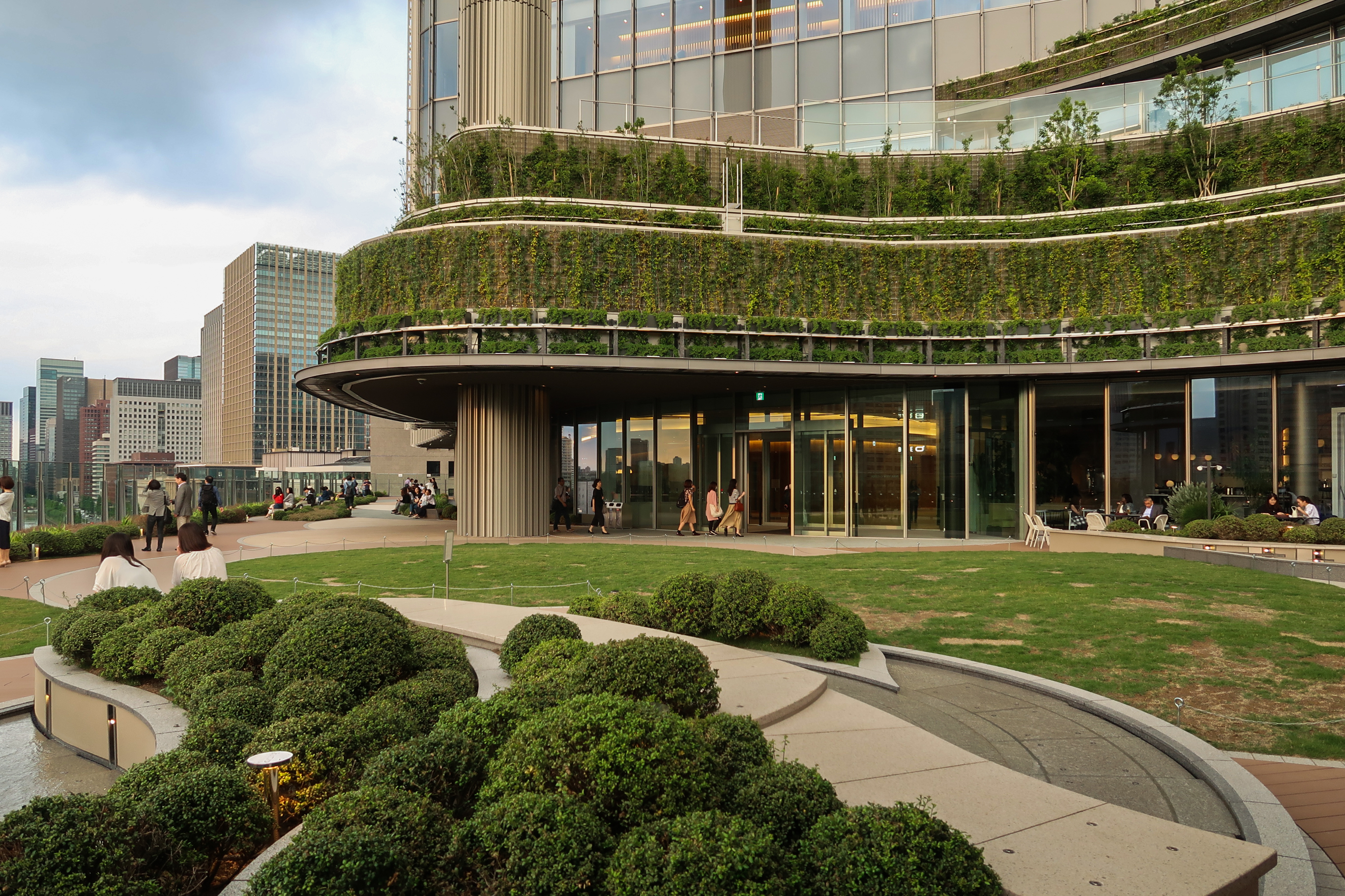 Tokyo Midtown Hibiya Level 6 Garden